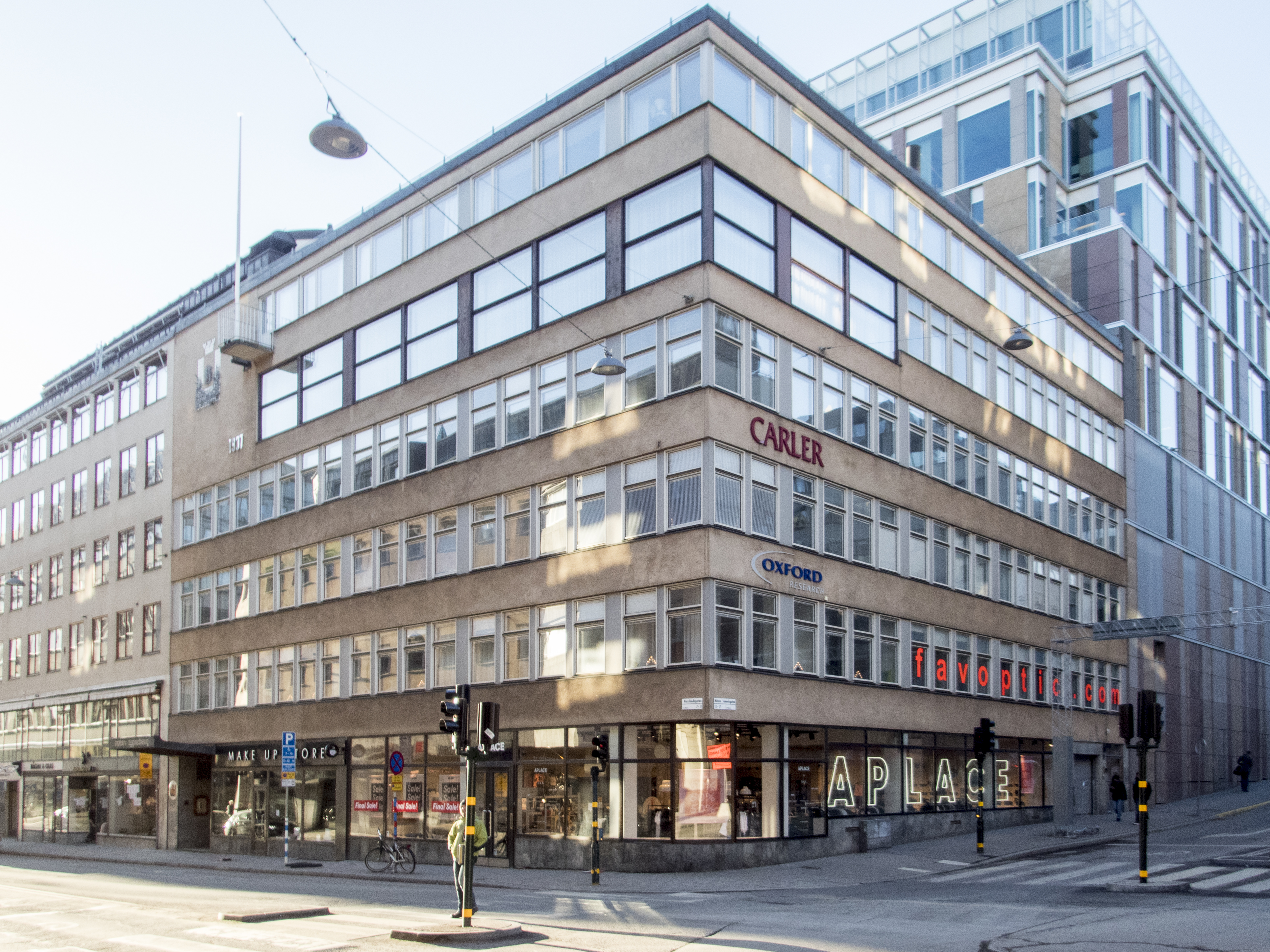 Stockholms Byggnadsförenings hus, Mäster Samuelsgatan 13, Norrlandsgatan 11, Nybyggnadsår 1936 - 1937, AB Stockholms Byggnadsförening (Byggherre) Carl Zetterberg (Byggmästare) Sven Markelius (Arkitekt)